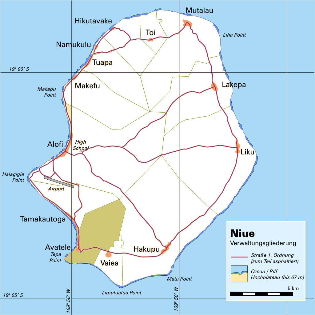 Posizione di Avatele a Niue